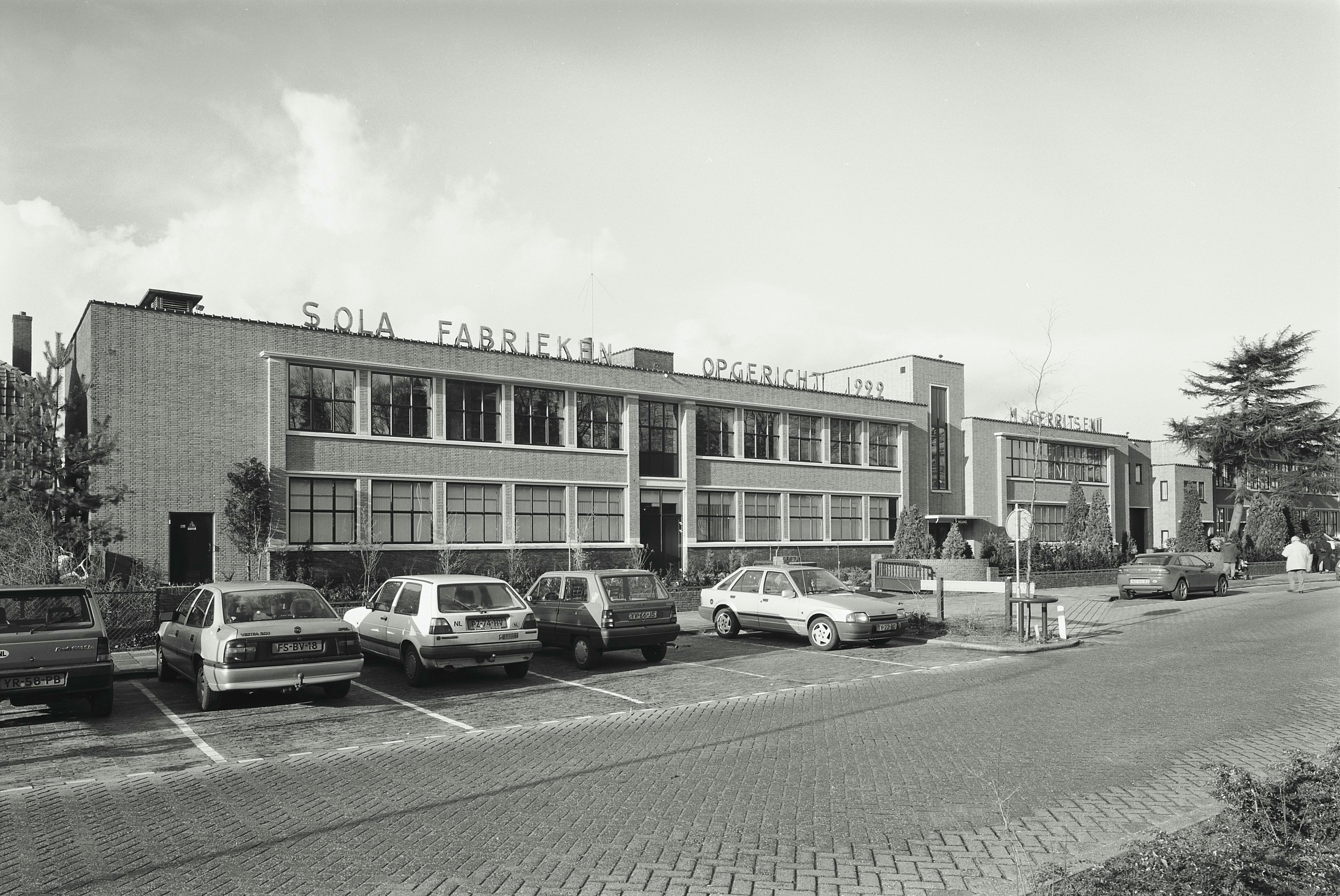 Sola Fabriek: Overzicht van gevel van de Sola fabriek (opmerking: Gefotografeerd voor het boek De Utrechtse Heuvelrug deel 2)